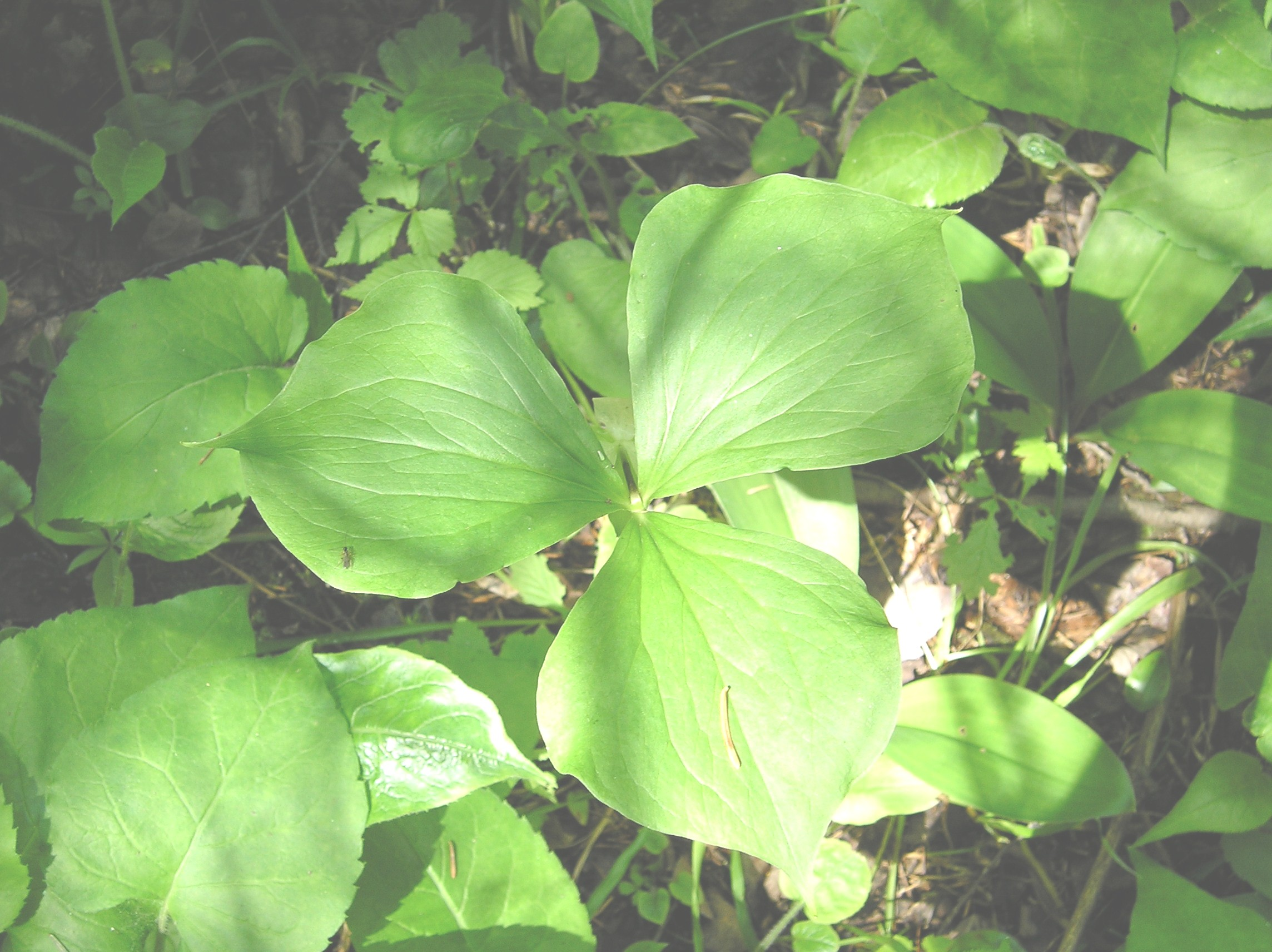 Trillium_cernuum_1-eheep